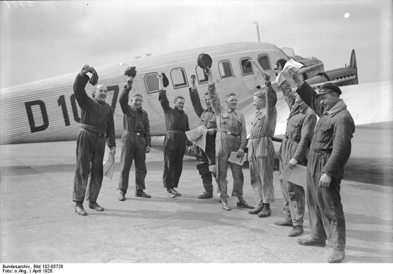 Zu dem erfolgreichen deutschen Ozeanflug der Junkersmaschine "Bremen"! Begeisterte Monteure der Deutschen Lufthansa auf dem Centralflughafen in Berlin-Tempelhof bringen nach der ersten Meldung der glücklichen Landung Hochrufe auf die Ozeanflieger aus.